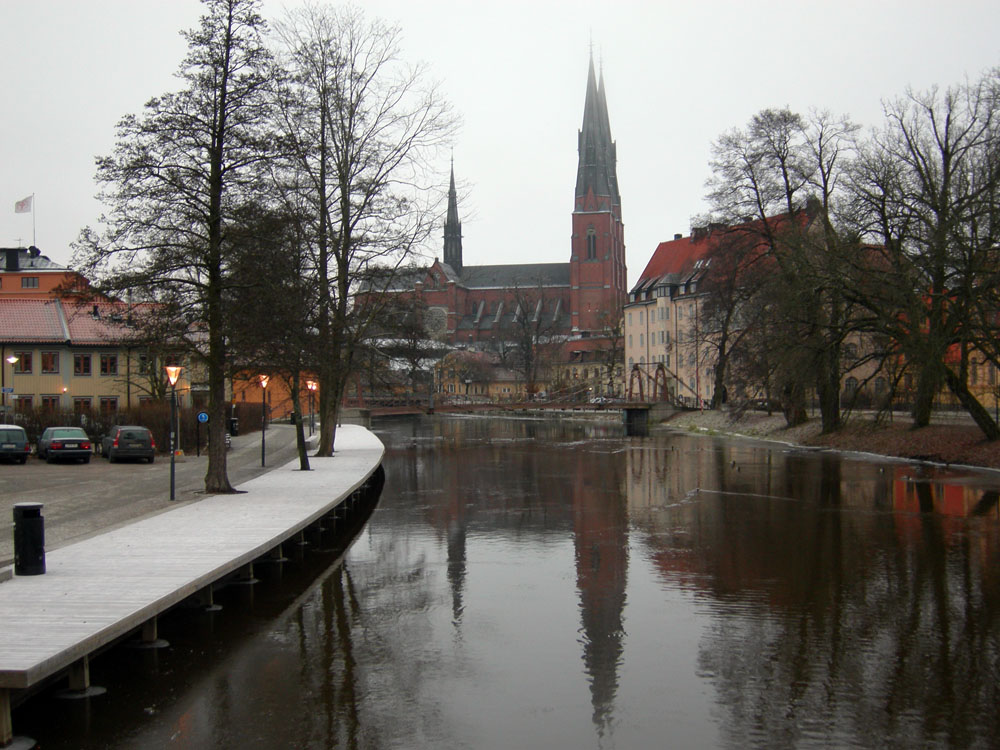 Fyris River in Uppsala (December 2007).